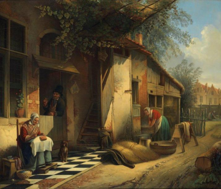 Scène de la vie familiale sur le pas de la porte dans une petite ville du Nord